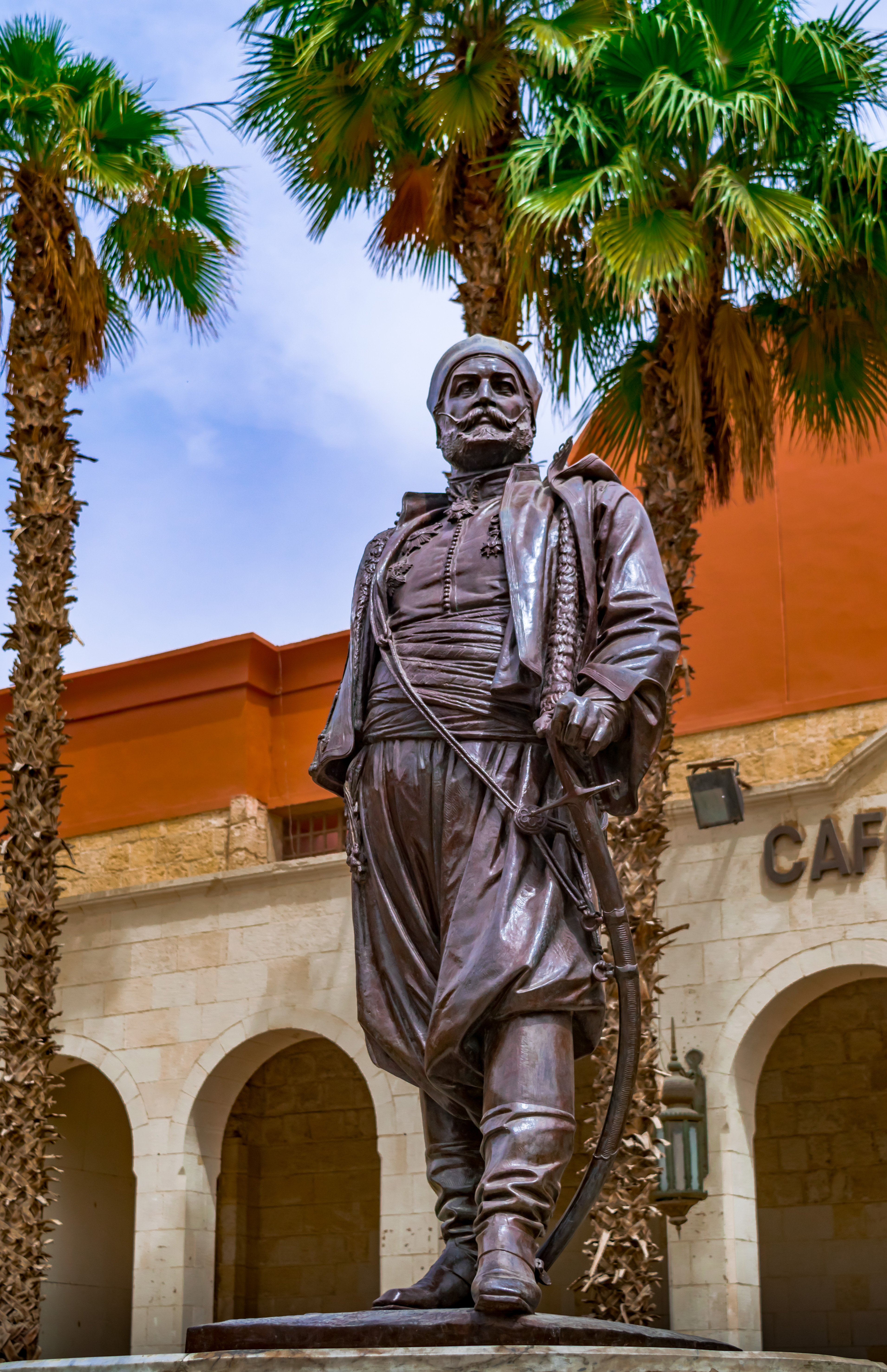 سليمان باشا الفرنساوى - المتحف الحربى القومى ، بقلعة صلاح الدين الايوبي سليمان باشا الفرنساوى مؤسس جيش مصر فى عهد محمد على. ولد سنة 1788 بفرنسا وتوفى سنة 1860 فى مصر